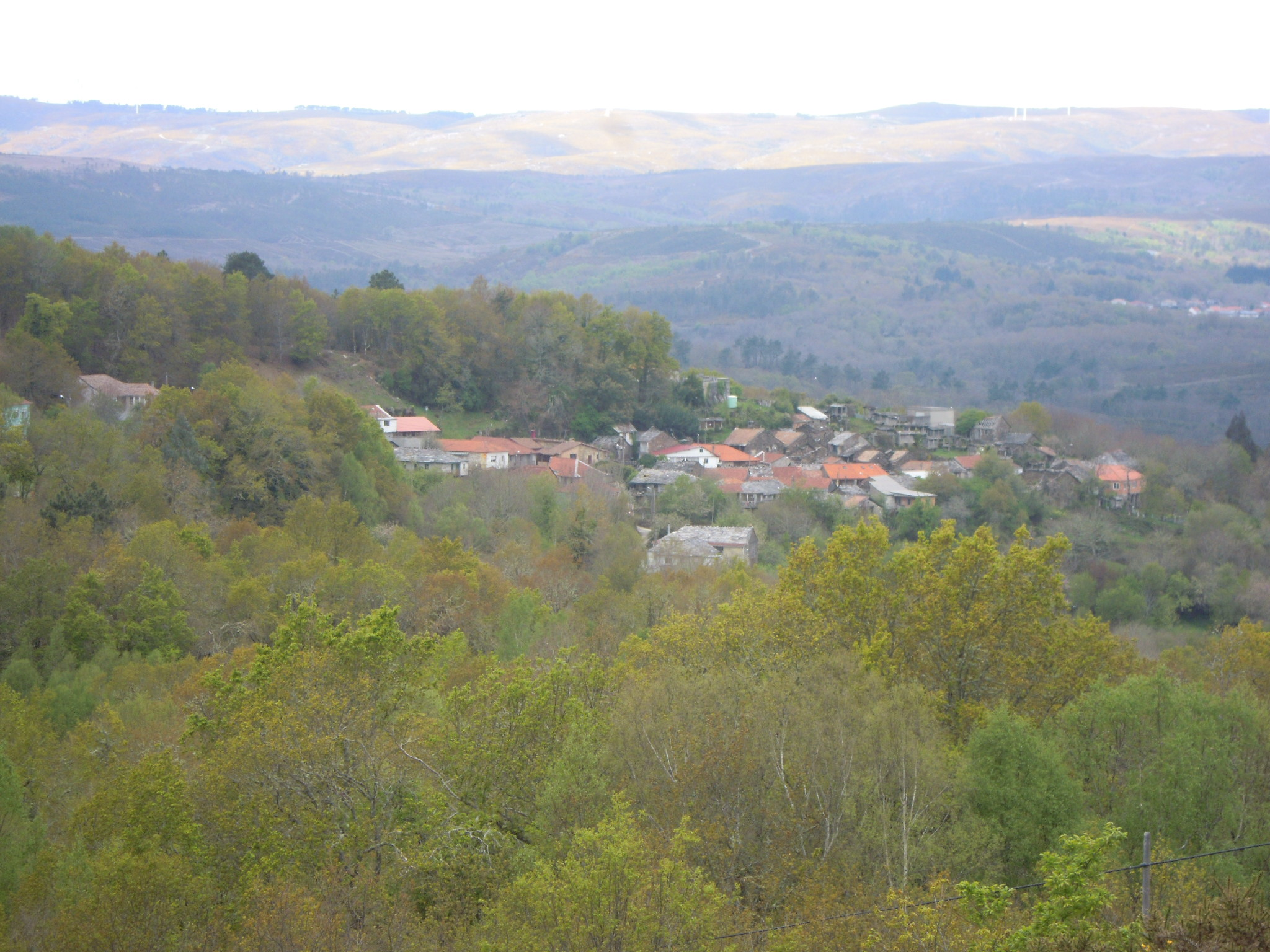 Vista xeral da aldea de Baíste, Baíste, Avión). Ao fondo, a serra do Seixo.